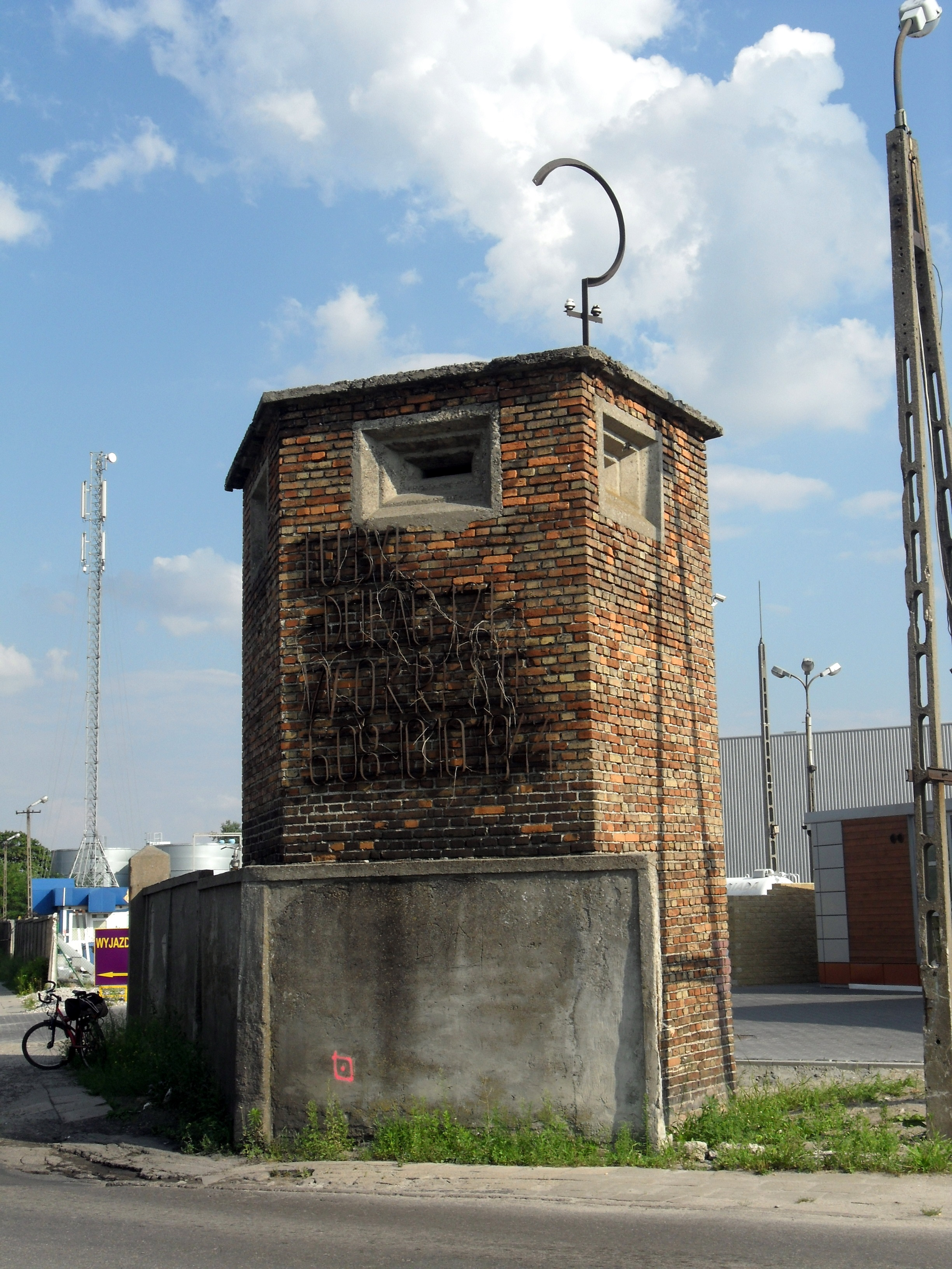 Wieża strażnicza dawnych ZNTK Pruszków, z napisem upamiętniającym obóz przejściowy